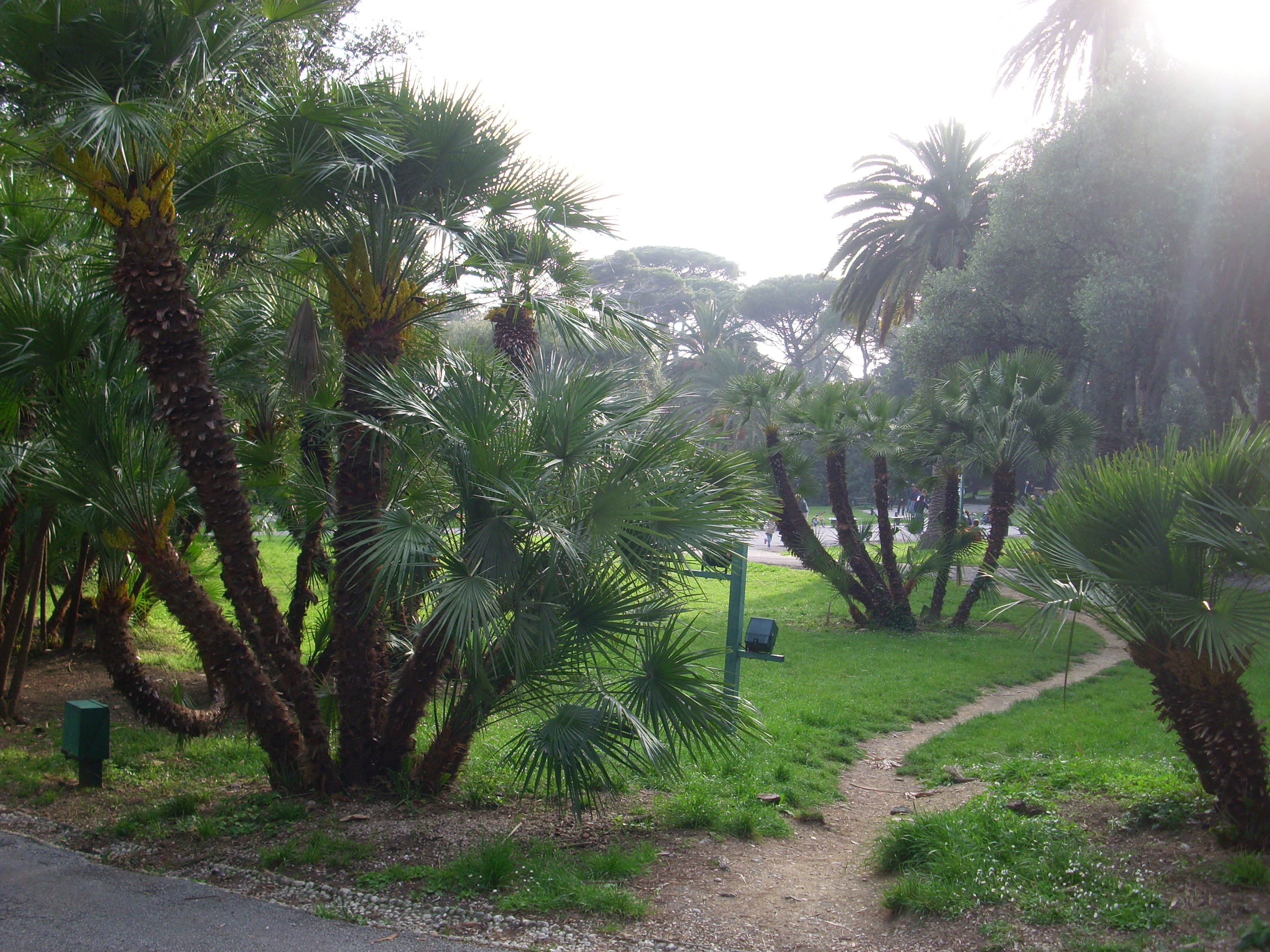 I parchi di Nervi. Sentiero tra gli alberi.